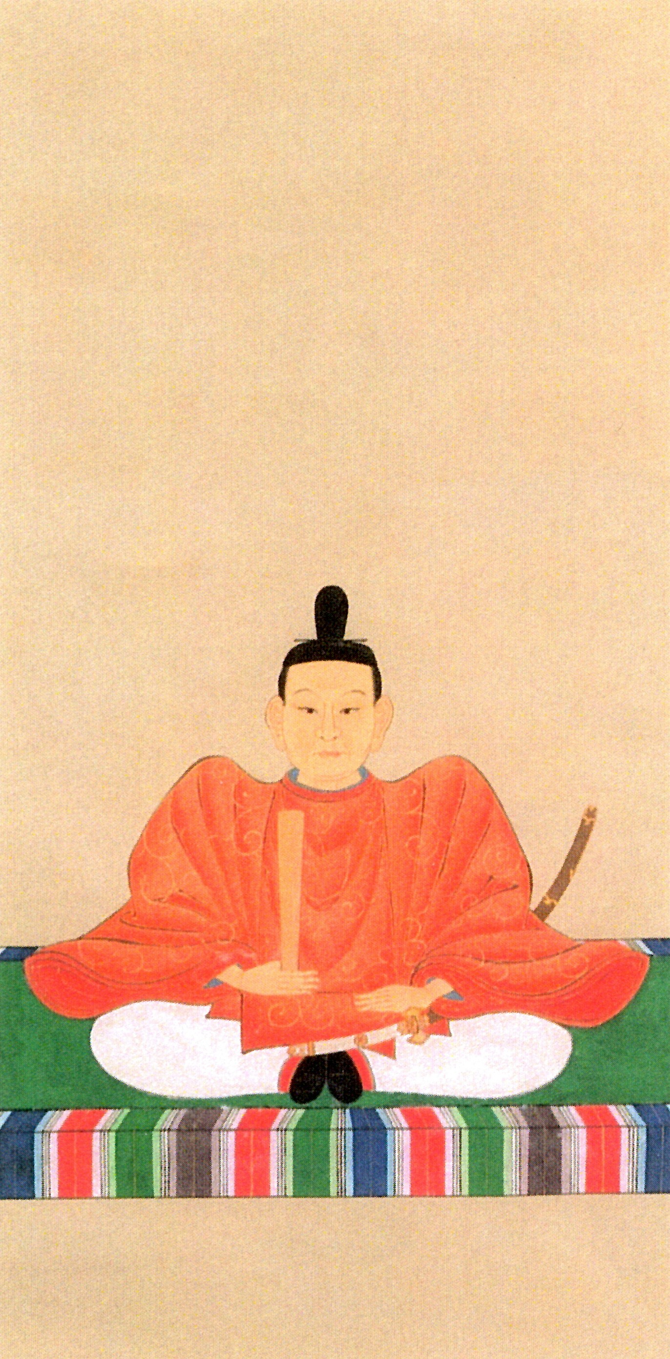 堀親昌の肖像(長姫神社所蔵の御神体である坐像を描いたもの)。